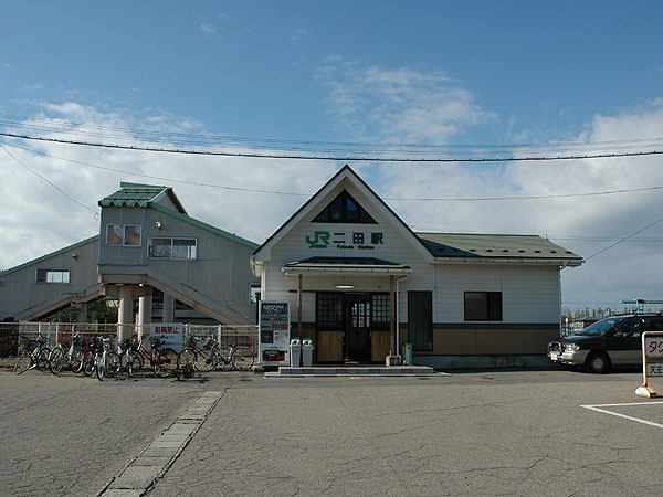 Futada Station, on the JR Oga Line, Katagami, Akita, Japan